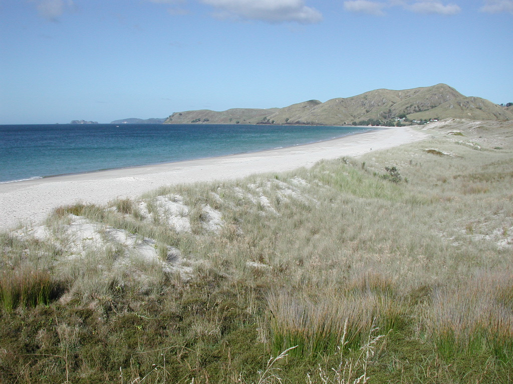 Otama Beach